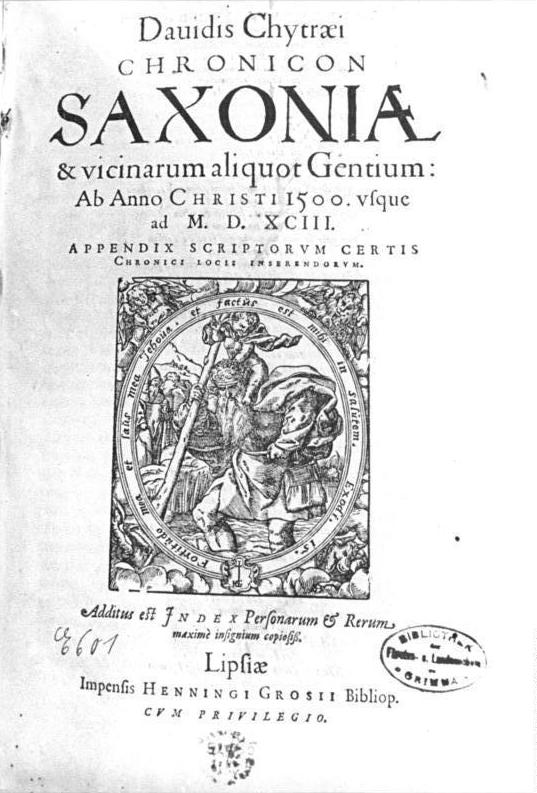 Chronicon Saxonia, Titelseite ADN-ZB Grubitzsch 21.1.87 Leipzig: Saxonia-Bestand in der Stadt- und Bezirksbibliothek- Dieses Werk aus dem 16. Jahrhundert, das die Geschichte der Sächsischen Provinzen behandelt, gehört zum Saxoniabestand. In über 7.000 Bänden wird die Geschichte des ehemaligen Königreiches und späteren Landes Sachsen und der sächsischen Provinzen dokumentiert. Die im wesentlichen bis zum 19. Jahrhundert aufgebaute Sammlung umfaßt nahezu alle Literatur über diese historische Zeit. - siehe auch 1987-0121-14 und 15N